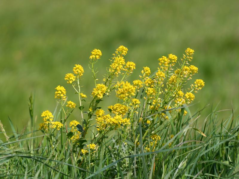 Gewöhnliches Barbarakraut (Barbarea vulgaris)